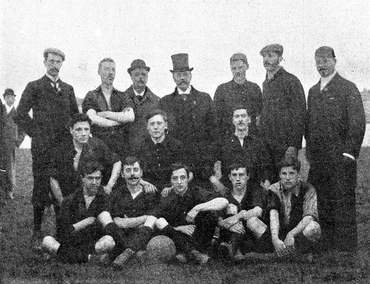 L'équipe du Standard Athletic Club le 3 avril 1898 le jour de la finale du championnat de France.